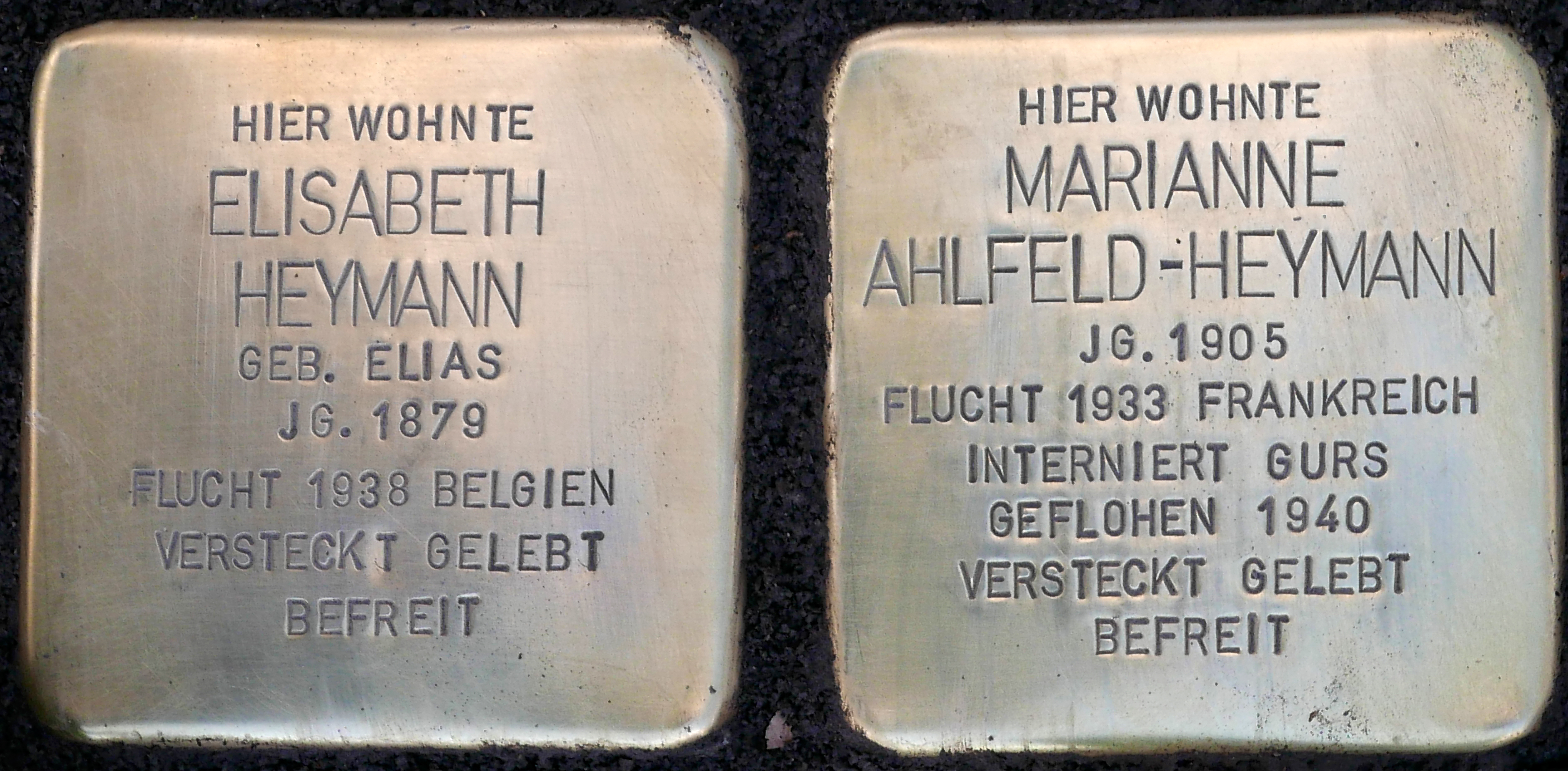 Stolpersteinverlegung 19. März 2019: Voigtelstrasse 9: Stolpersteine für Elisabeth Heymann und Marianne Ahlfeld-Heymann